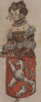 Anežka Přemyslovna (1268)